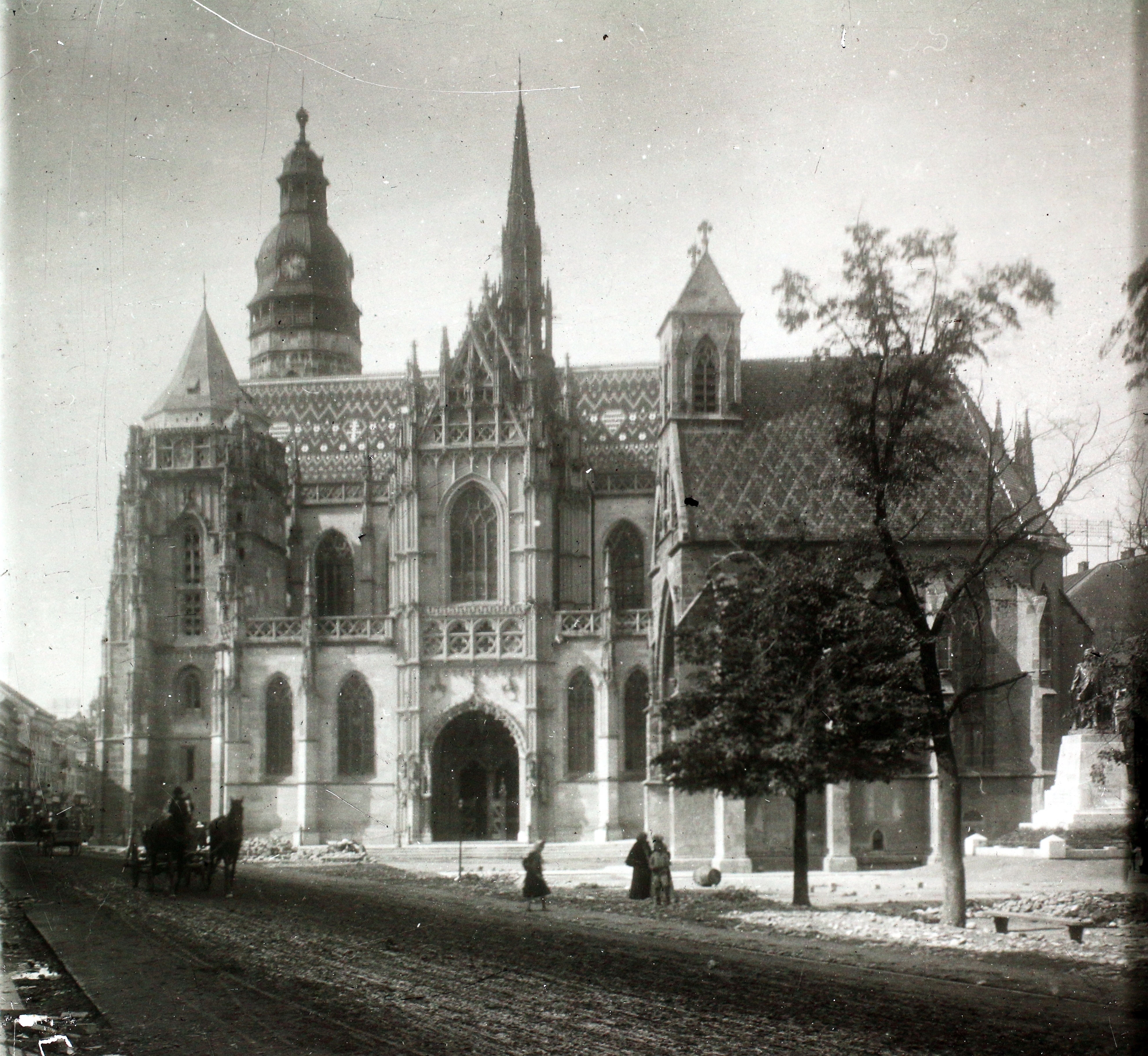 Fő utca (ulica Hlavná), Szent Erzsébet-főszékesegyház (Dóm), előtte a Szent Mihály-templom. Location: Slovakia, Kosice Tags: square, sculpture, Cathedral, Catholic Church, Gothic tracery, Horse-drawn carriage, chapel, monument Title: Fő utca (ulica Hlavná), Szent Erzsébet-főszékesegyház (Dóm), előtte a Szent Mihály-templom.